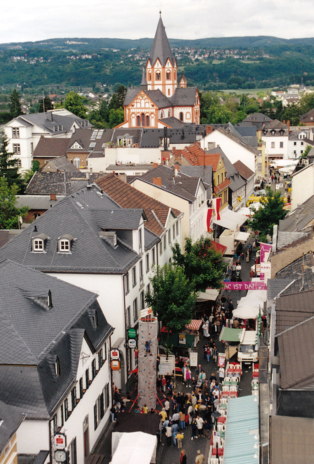 Sinziger Innenstadt mit der Bachovenstraße anlässlich des Stadtfestes „Sprudelndes Sinzig“